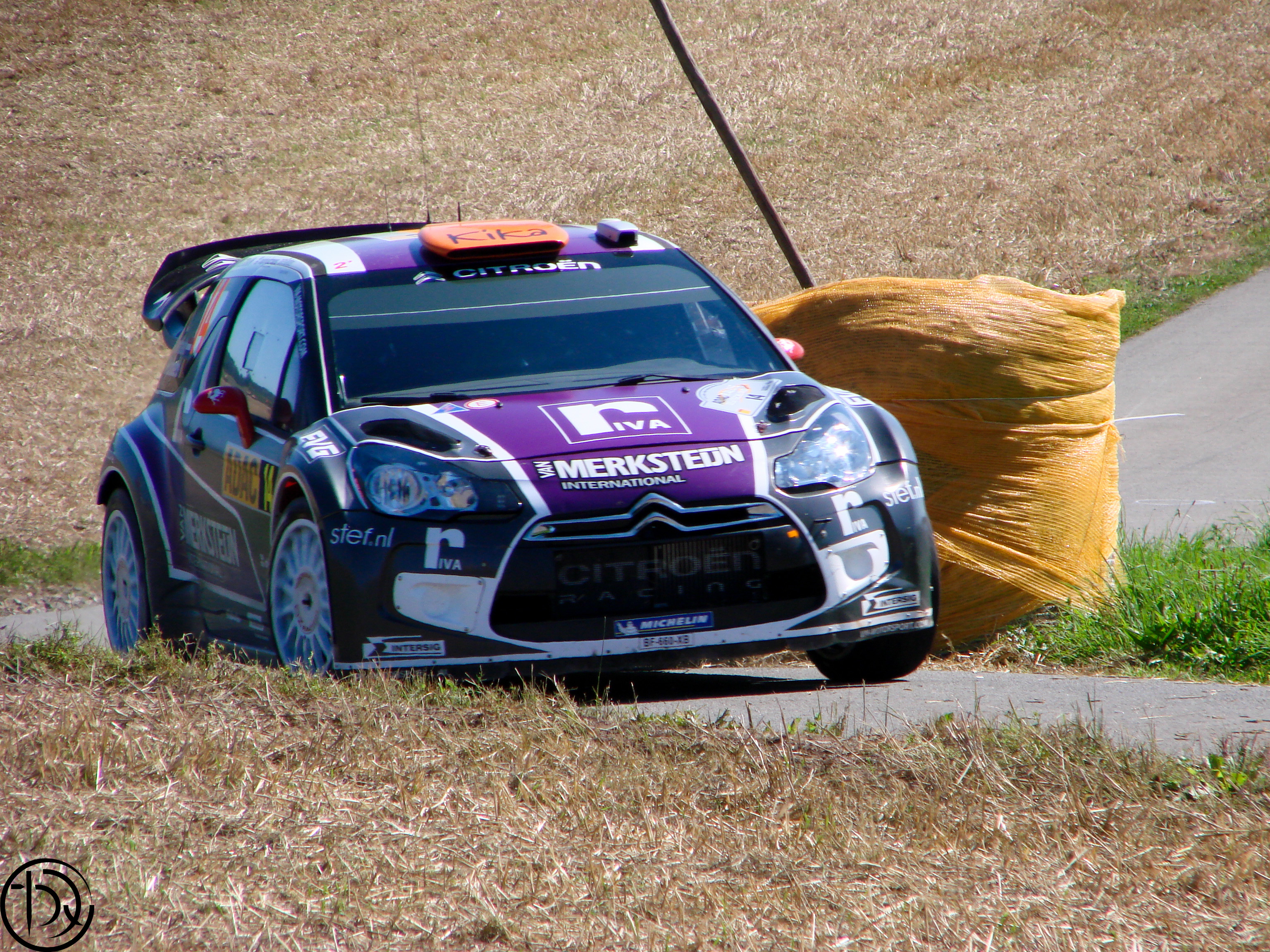 Peter van Merksteijn jr. drives his Citroën DS3 WRC at the 2011 Rallye Deutschland.